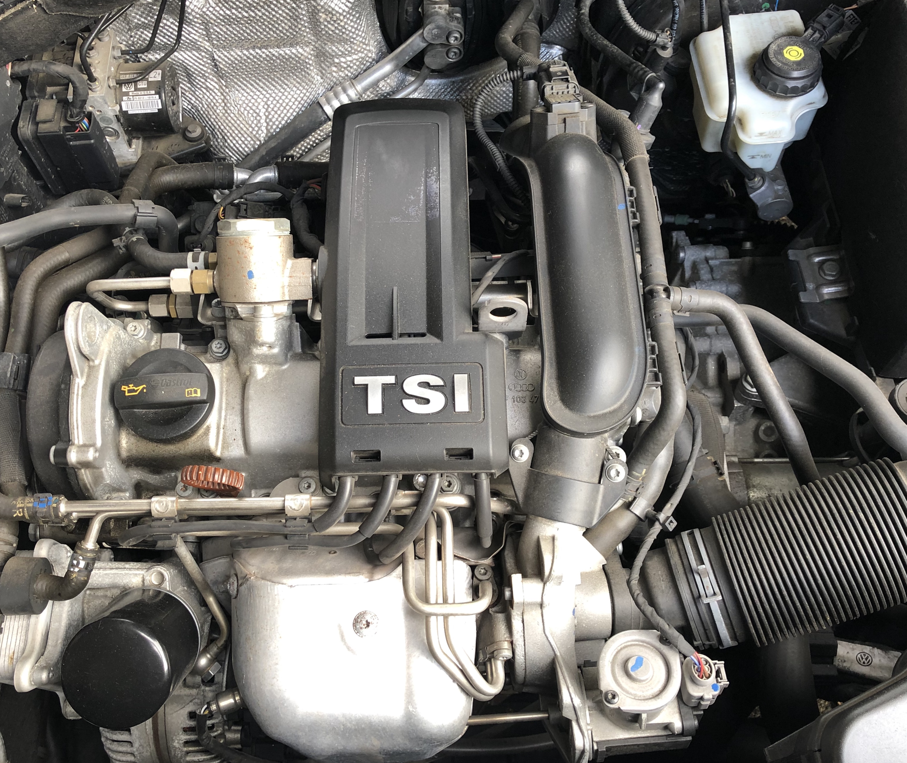 VW EA111 CBZB im Golf V (105ps)